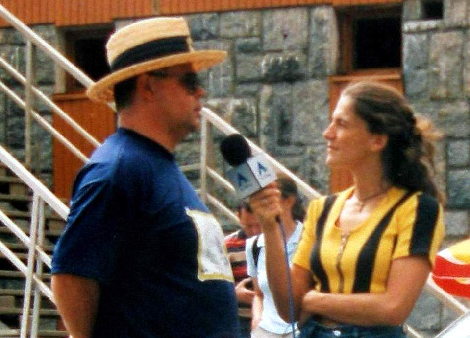 Marián Kochanský pri rozhovore s moderátorkou na Štrbskom Plese rok 1999.